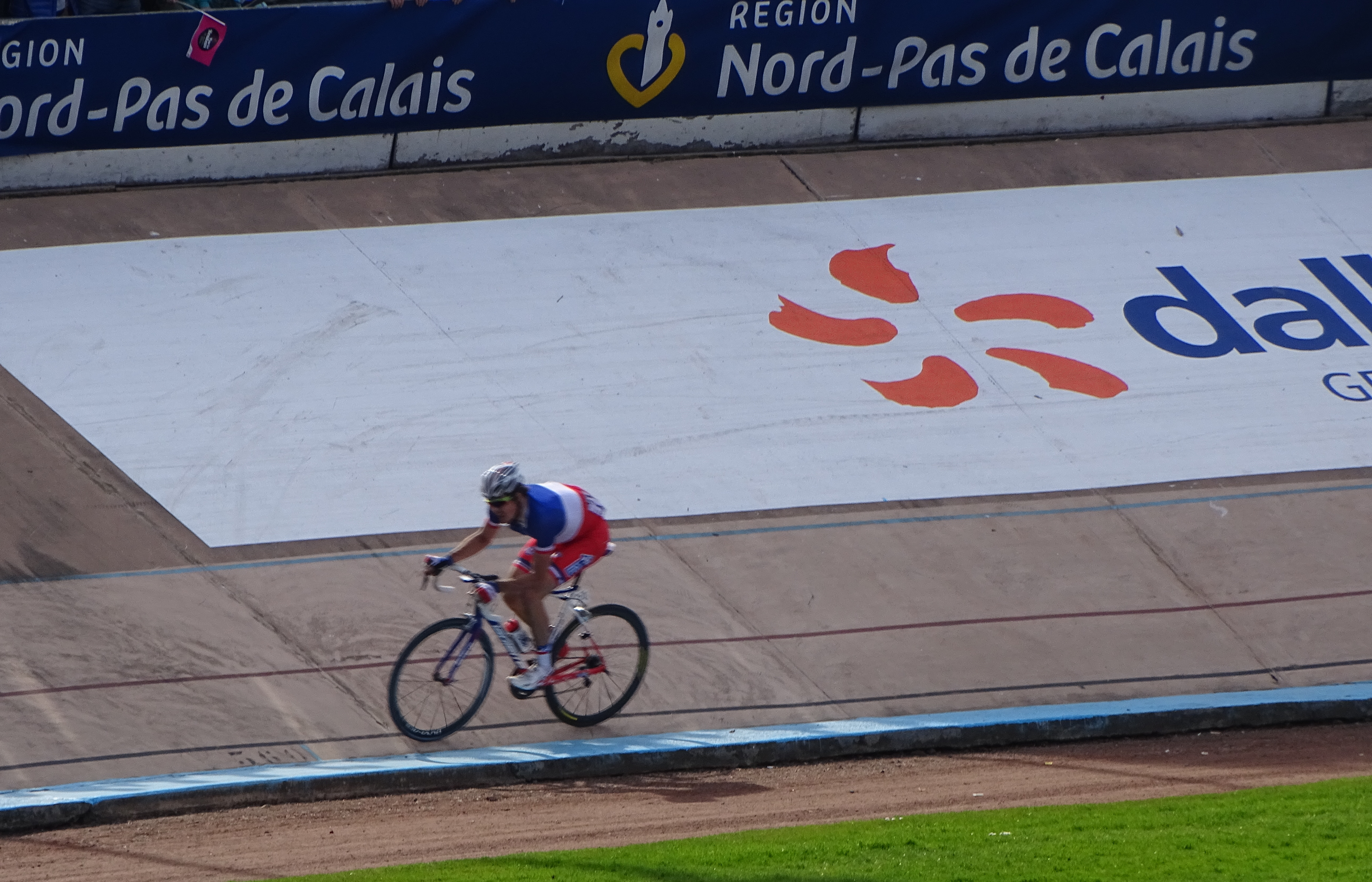 Reportage réalisé le dimanche 12 avril à l'occasion de l'arrivée du Paris-Roubaix 2015 à Roubaix, France.